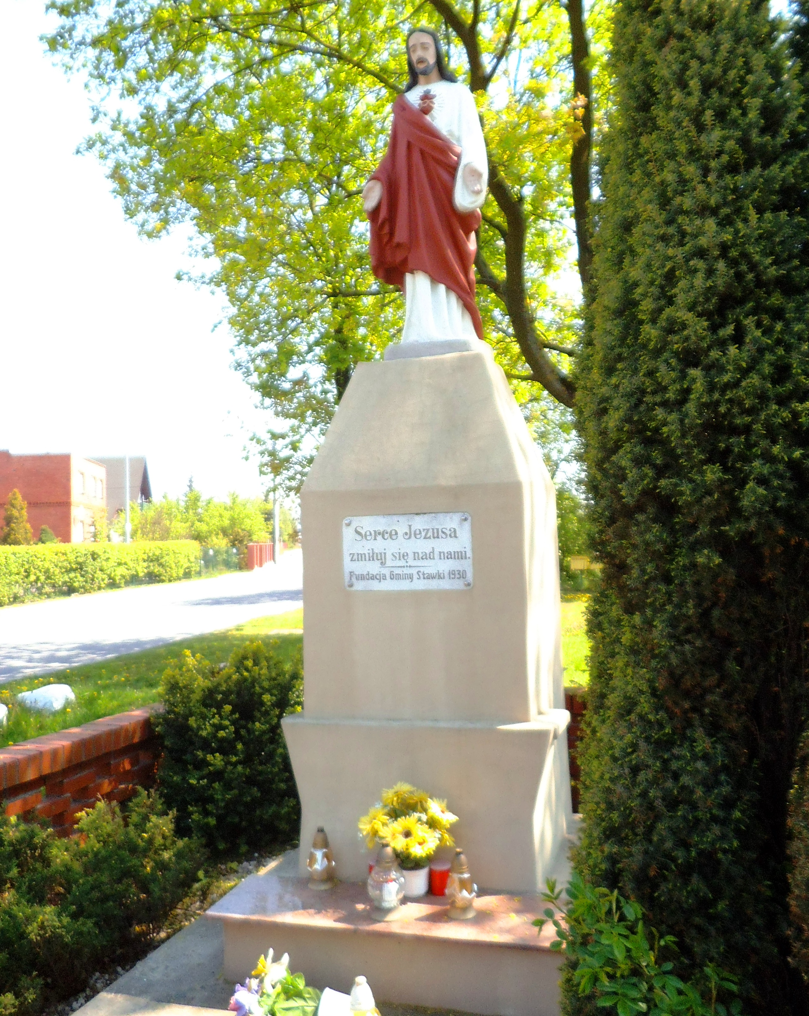 Figura Chrystusa na Rudaku w Toruniu, tekst pod figurą: Serce Jezusa zmiłuj się nad nami. Fundacja Gminy Stawki 1930